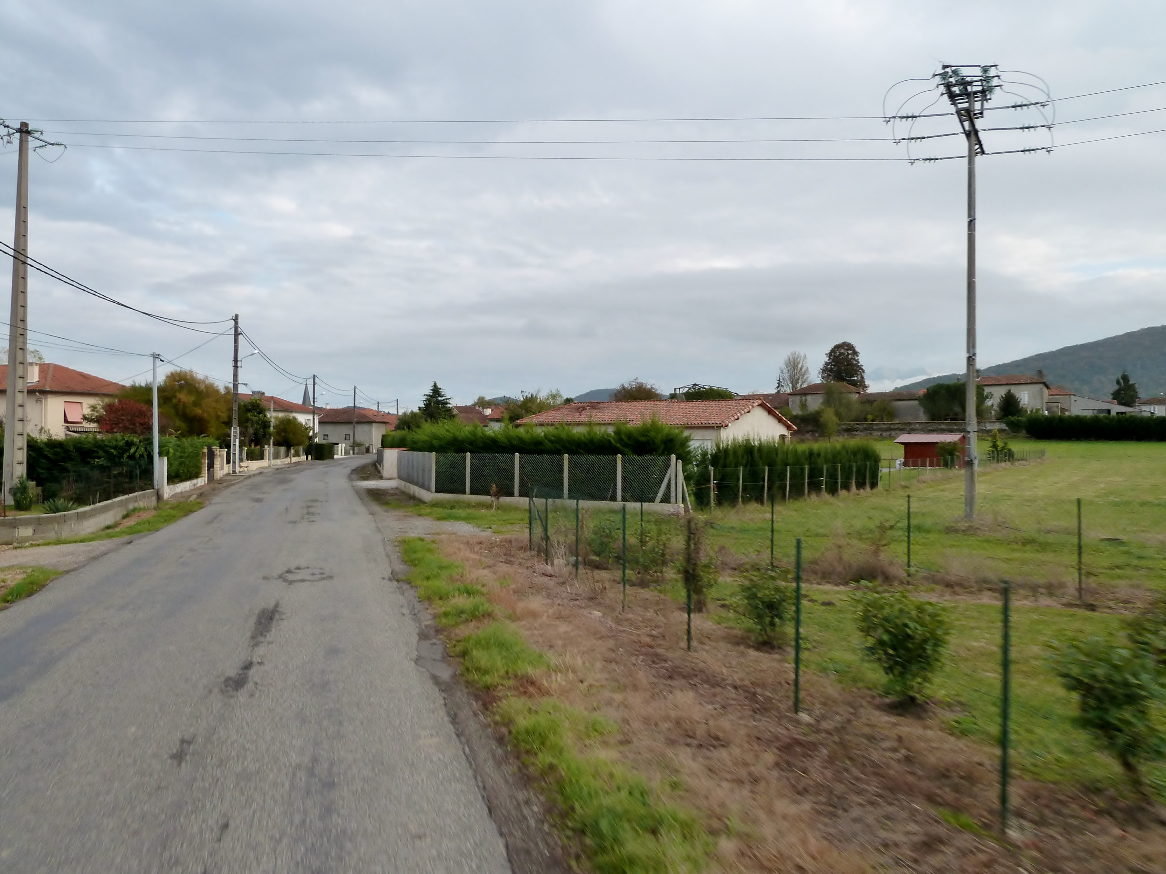 Labarthe-Rivière